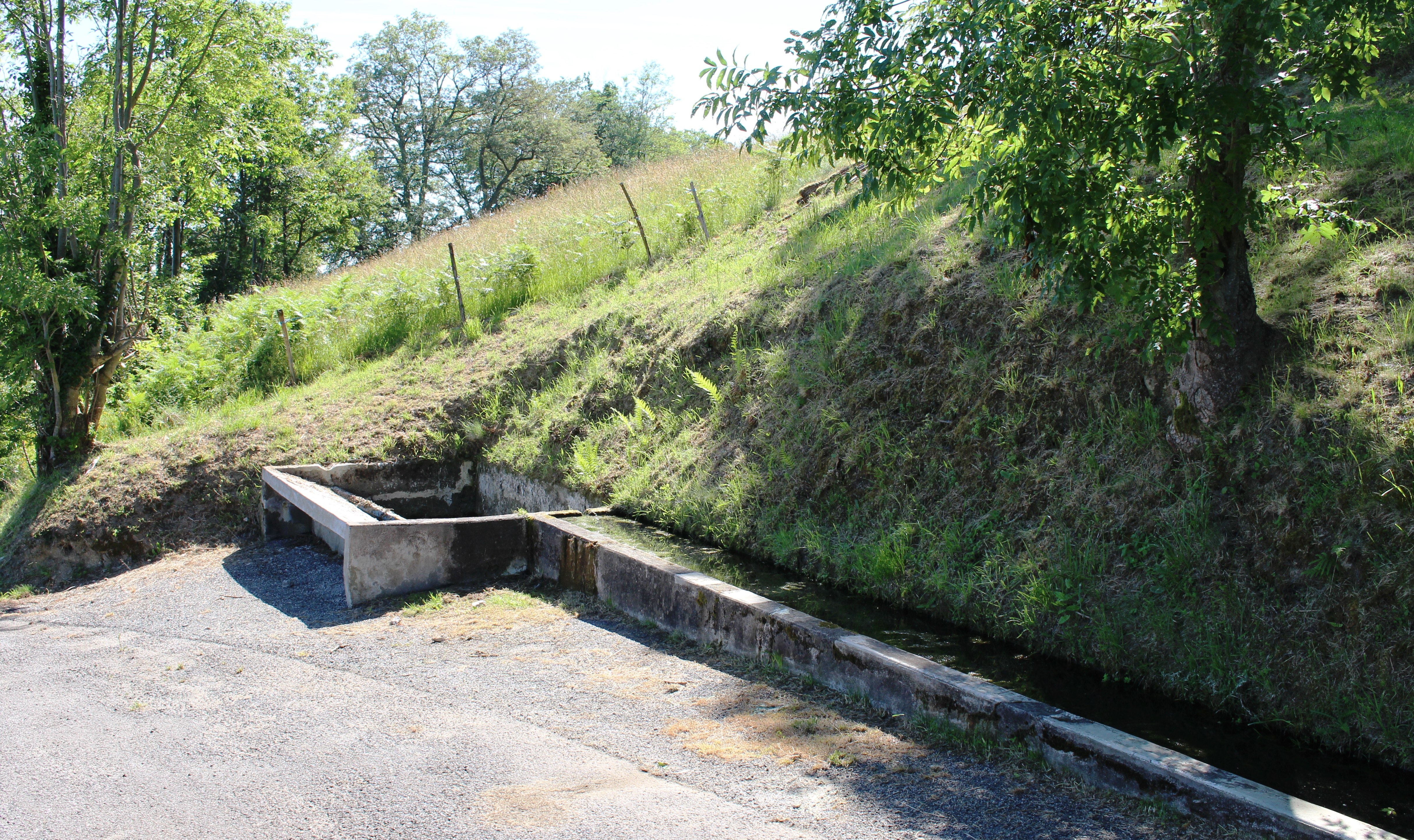 Lavoir de Castillon (Hautes-Pyrénées)